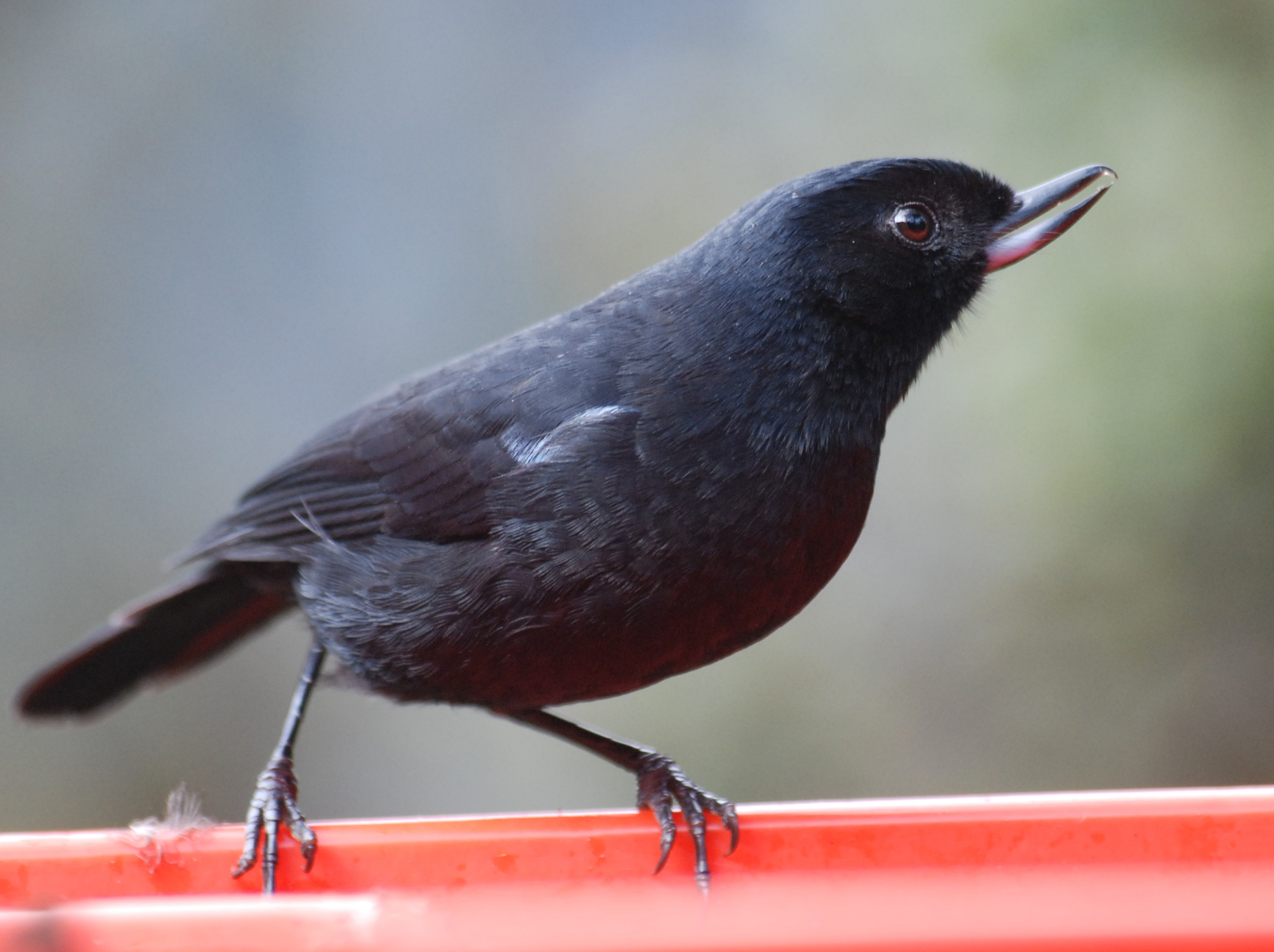 Glossy Flower-piercer (Diglossa lafresnayii), Ecuador.